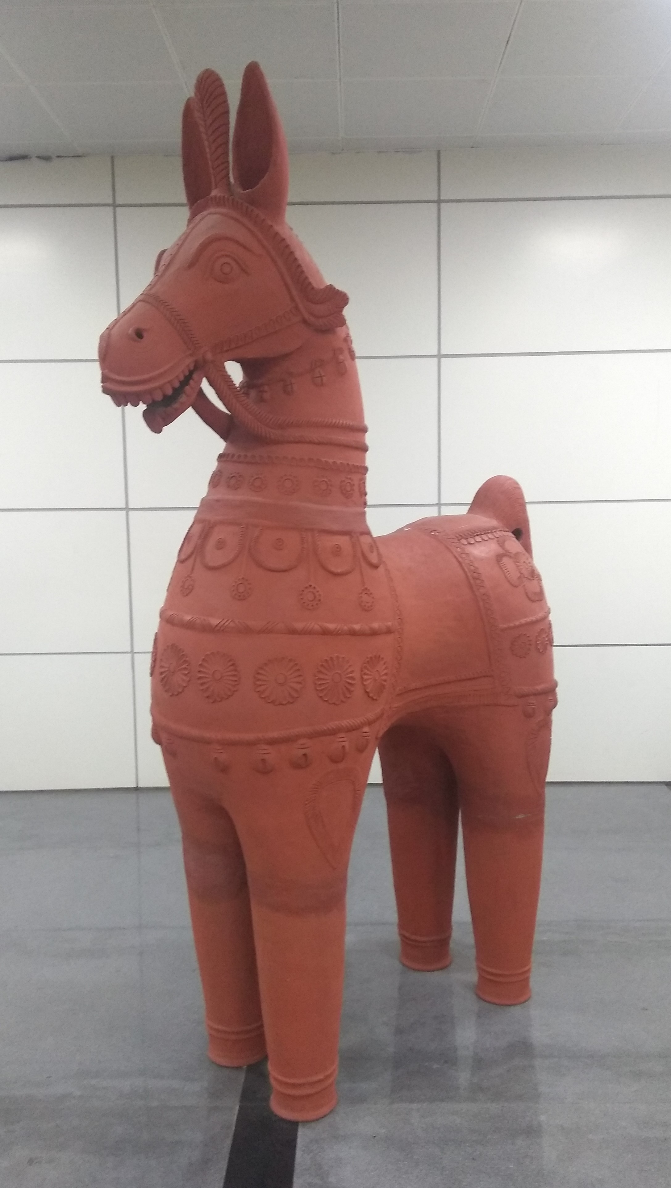 கோயம்புத்தூர் பன்னாட்டு வானூர்தி நிலையத்தில் காணப்படும் குதிரையின் சுடுமண் படிமம்.